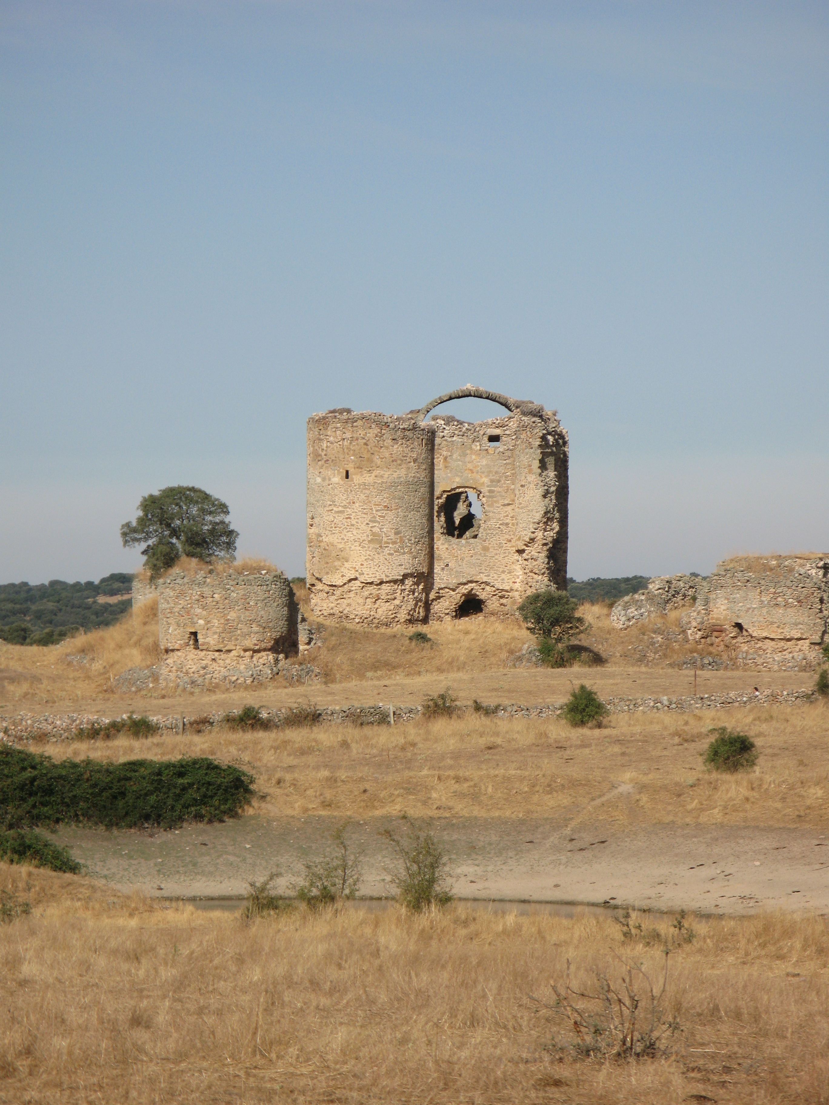 Castillo del Asmesnal en Alfaraz de Sayago, provincia de Zamora, Castilla y León, España